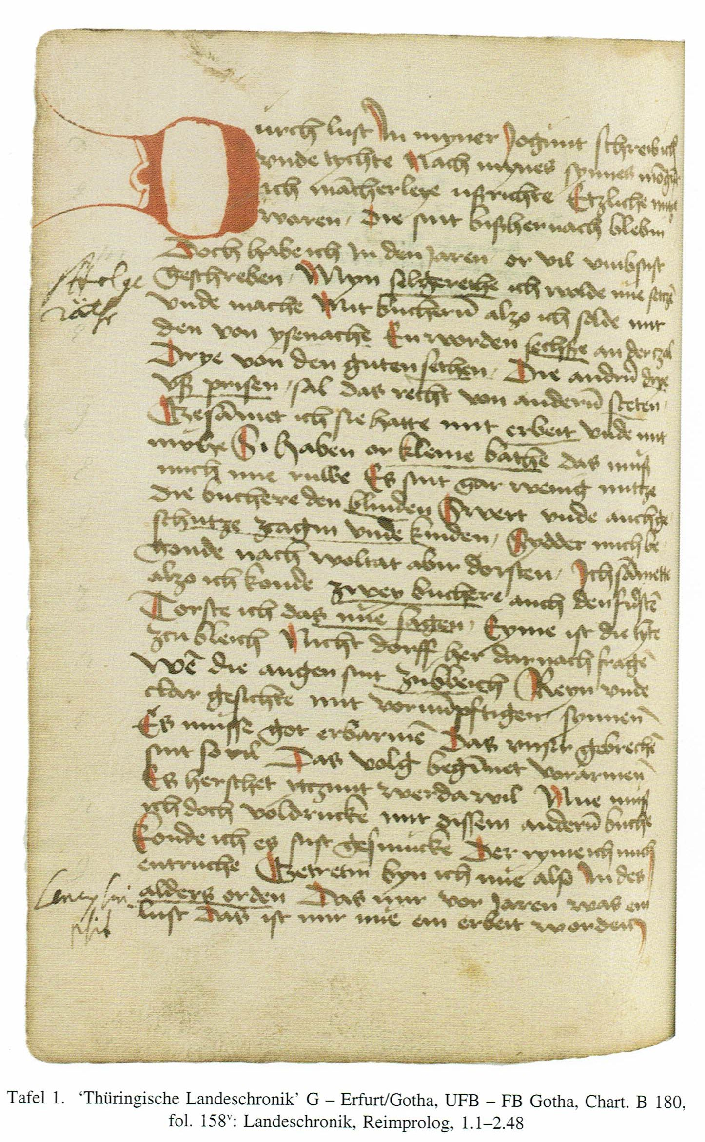 Thüringische Landeschronik. FB Gotha Chart B 80, Bl. 158v